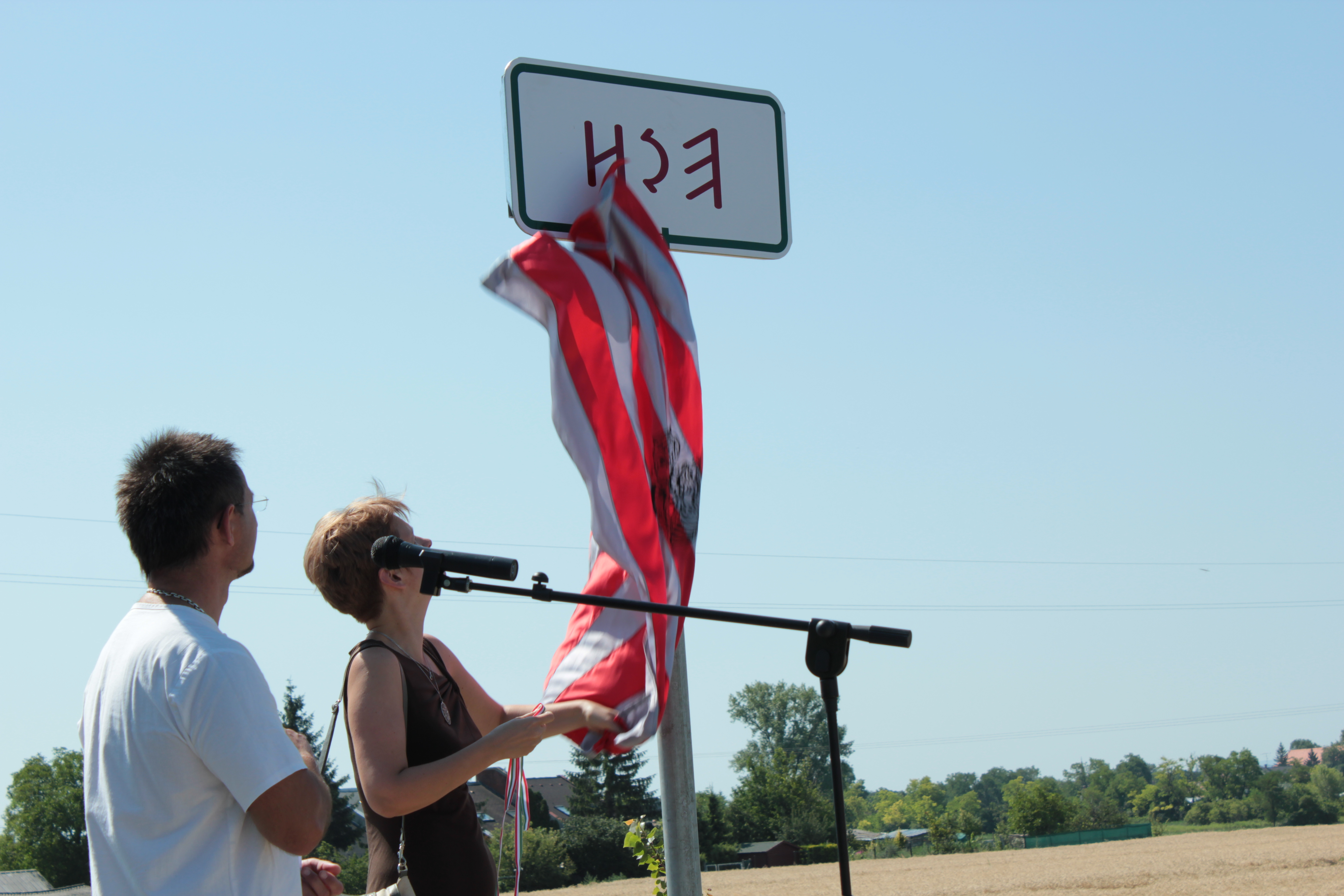 Rovásos helynév-táblát avattak Péren, 2011.07.09-én